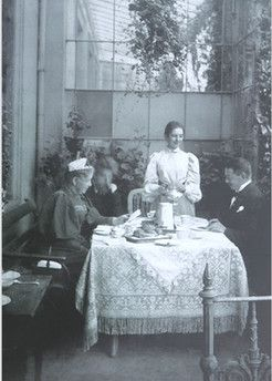 Carl Woldemar Becker (31. Januar 1841, Odessa – 30. November 1901, Bremen) Mathilde Becker, geborene von Bültzingslöwen (3. November 1852, Lübeck – 22. Januar 1926, Bremen) im Wintergarten in der Schwachhauser Chaussee 23, Bremen